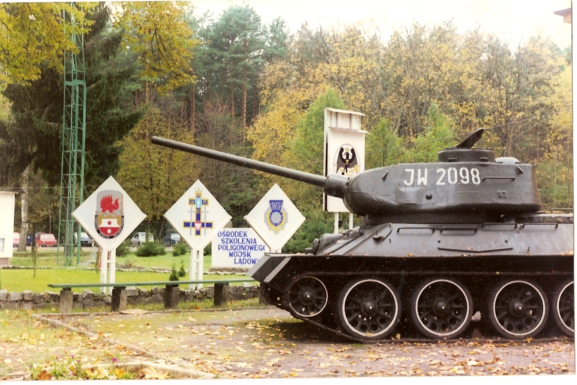 Wejście do koszar komendy poligonu - Bemowo Piskie